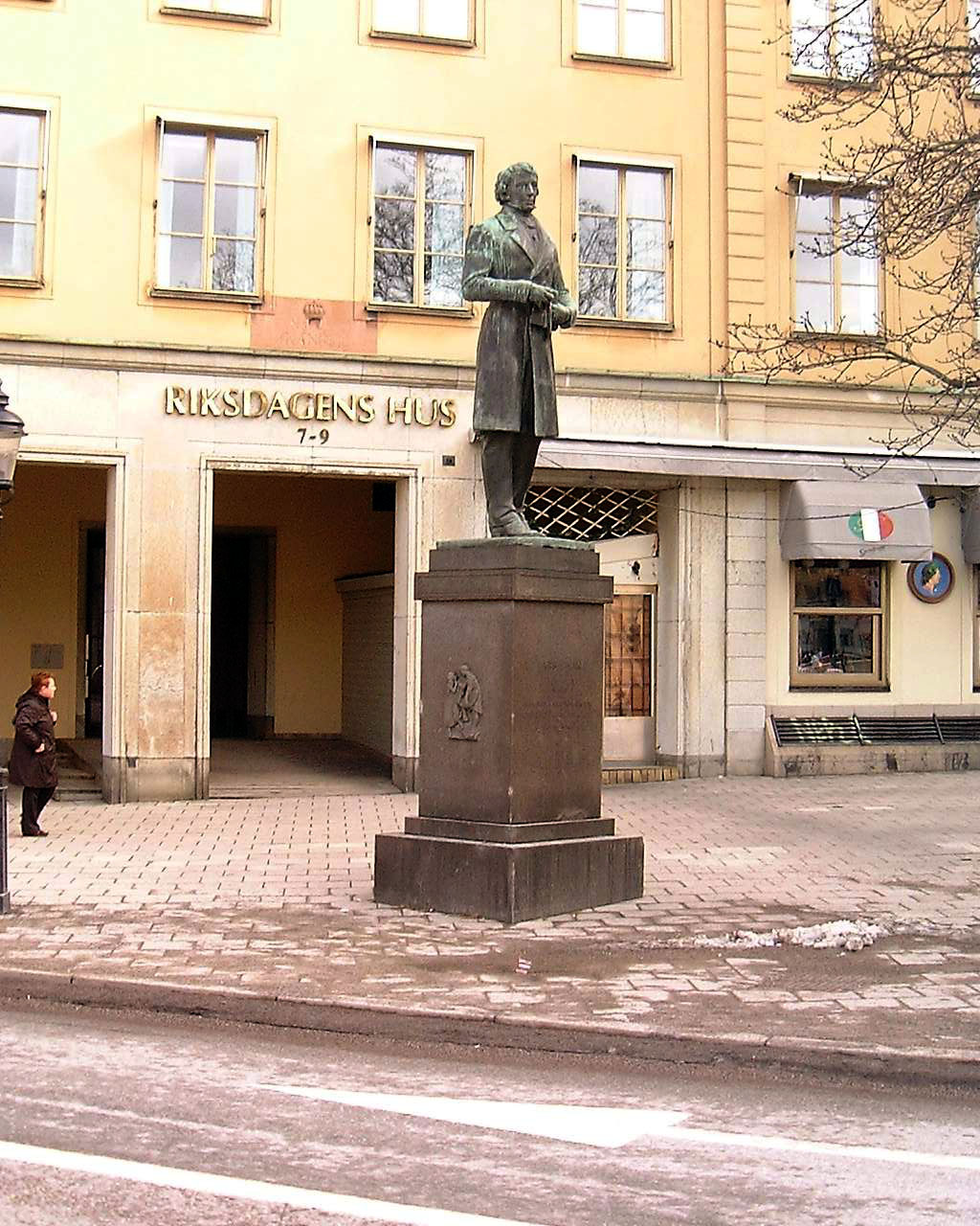 Sculpture of Lars Johan Hierta at Riddarhustorget, Gamla stan, Stockholm.